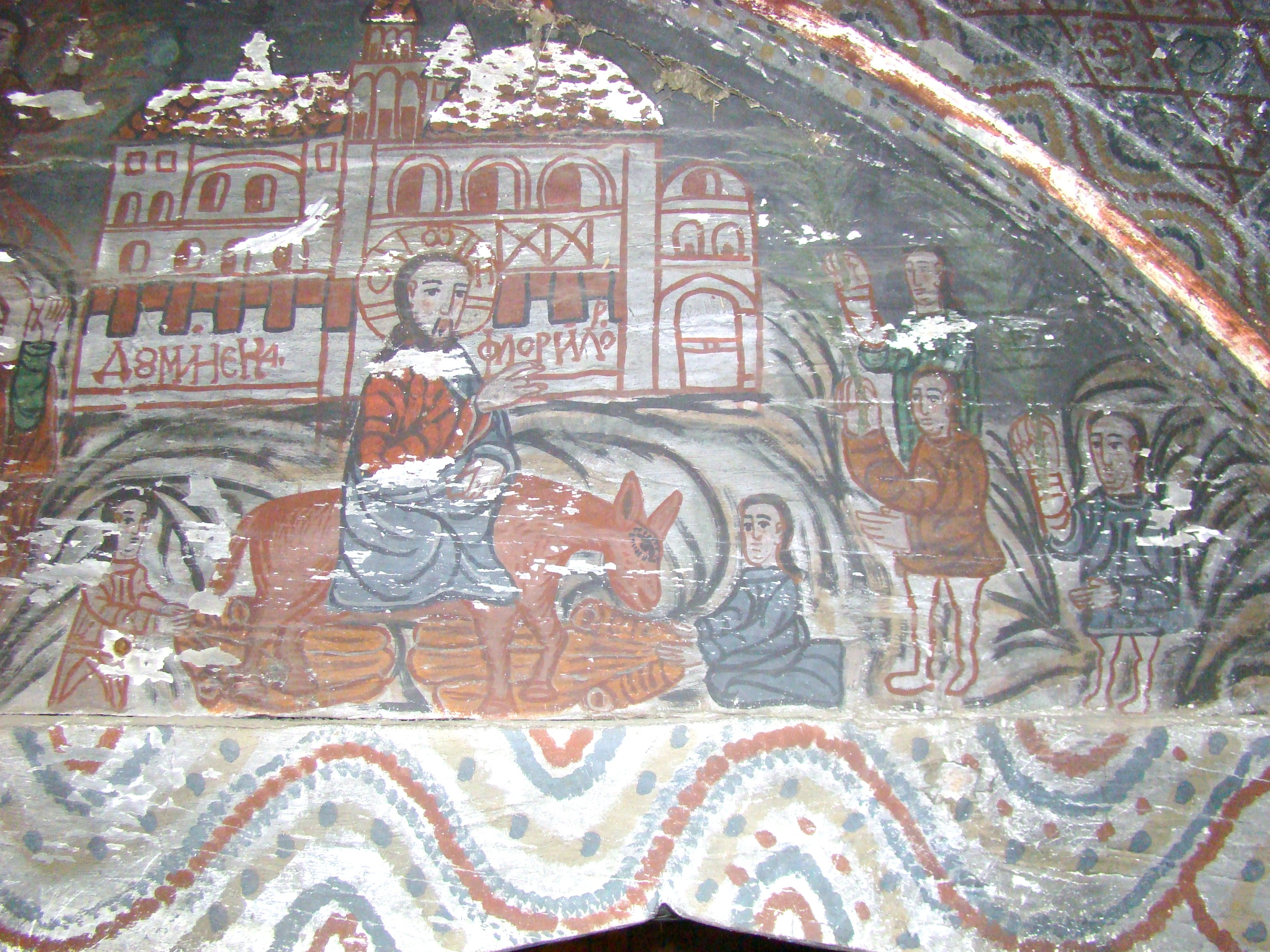 Biserica de lemn din Agârbiciu, județul Cluj